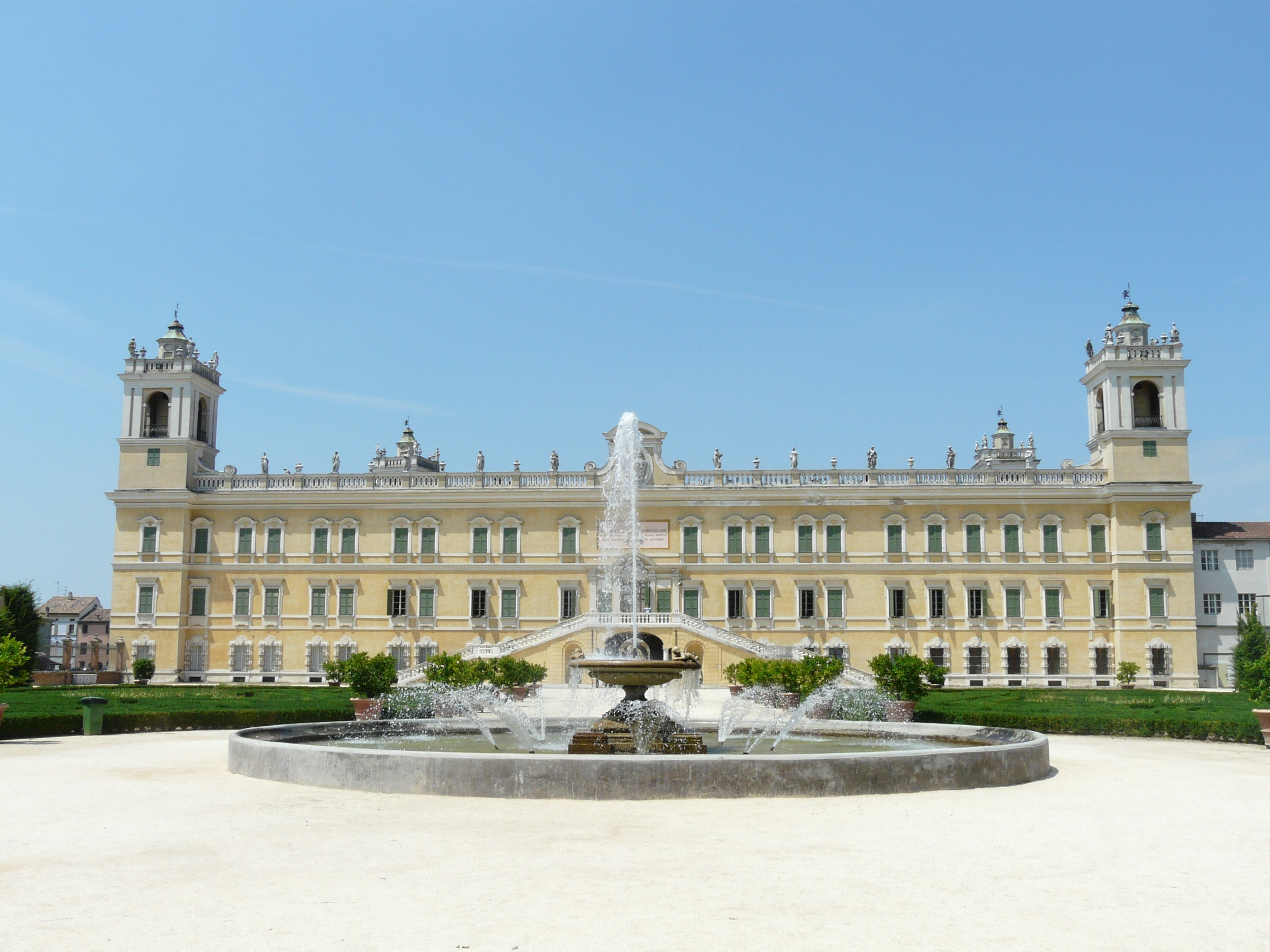 Immagini della Reggia di Colorno, Emilia-Romagna, Italia